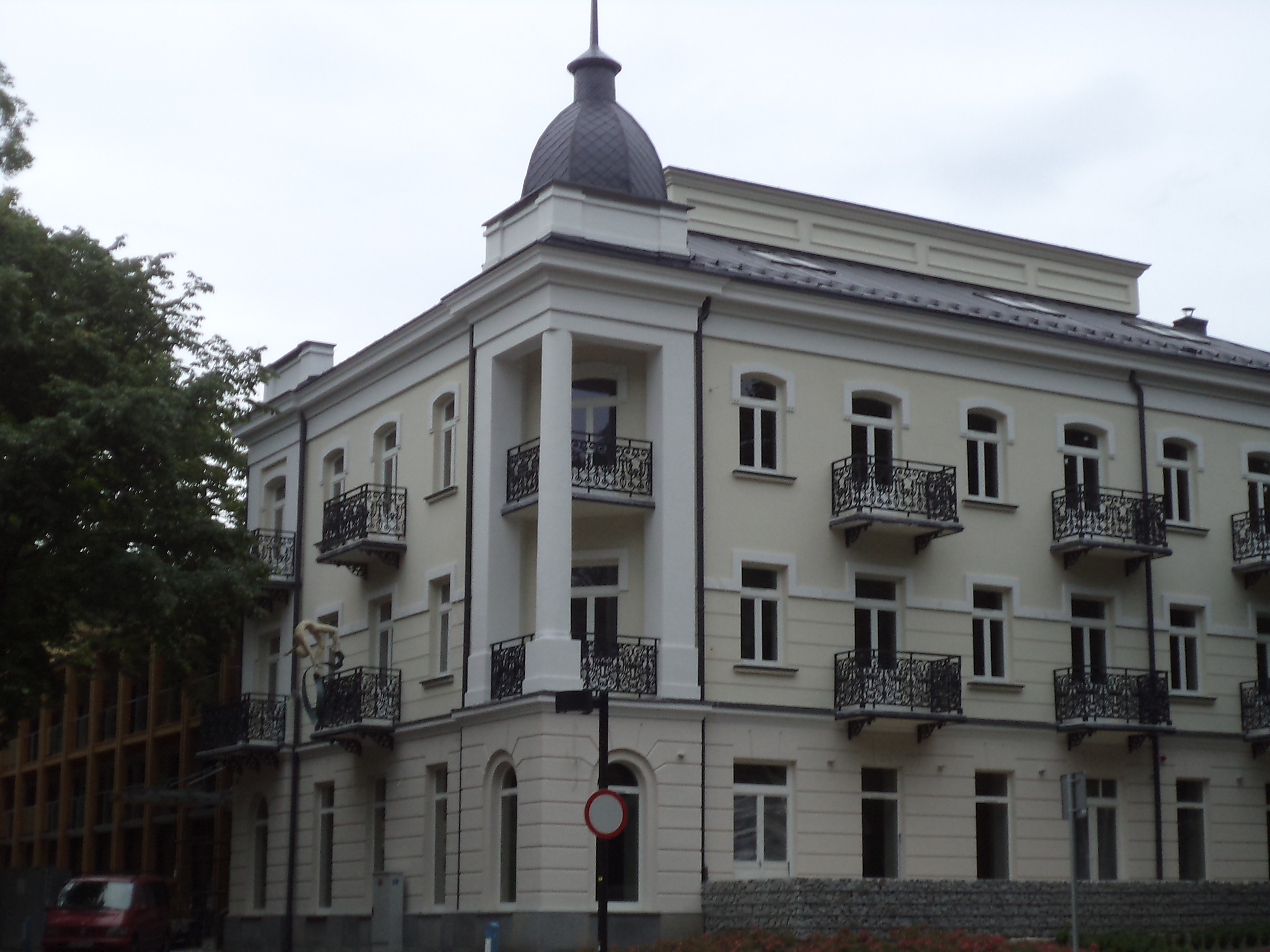 Busko-Zdrój, ul. 1 Maja 1 - Willa „Bristol”, pocz. XX w